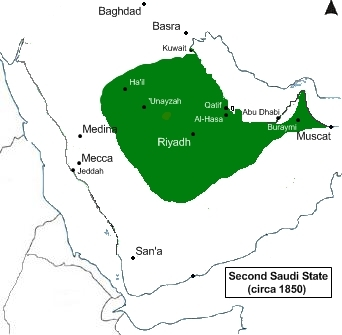 Second Saudi State, circa 1850.